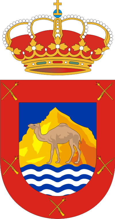 Escudo de Tuineje (Fuerteventura, Las Palmas, España)